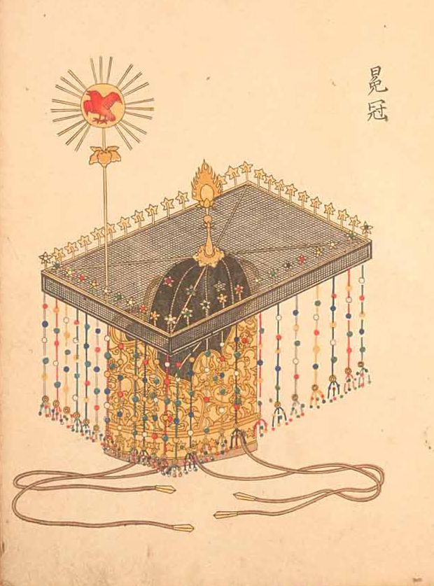 冕冠（天皇礼冠）の図